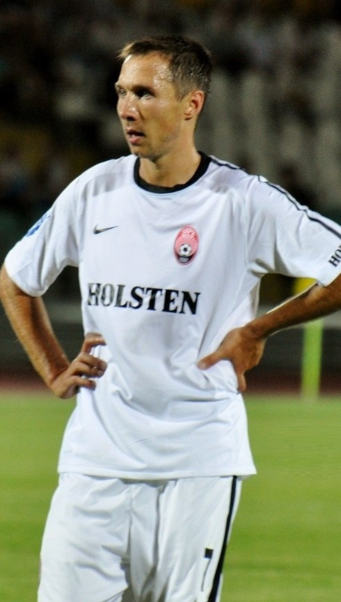 Павел Худзик